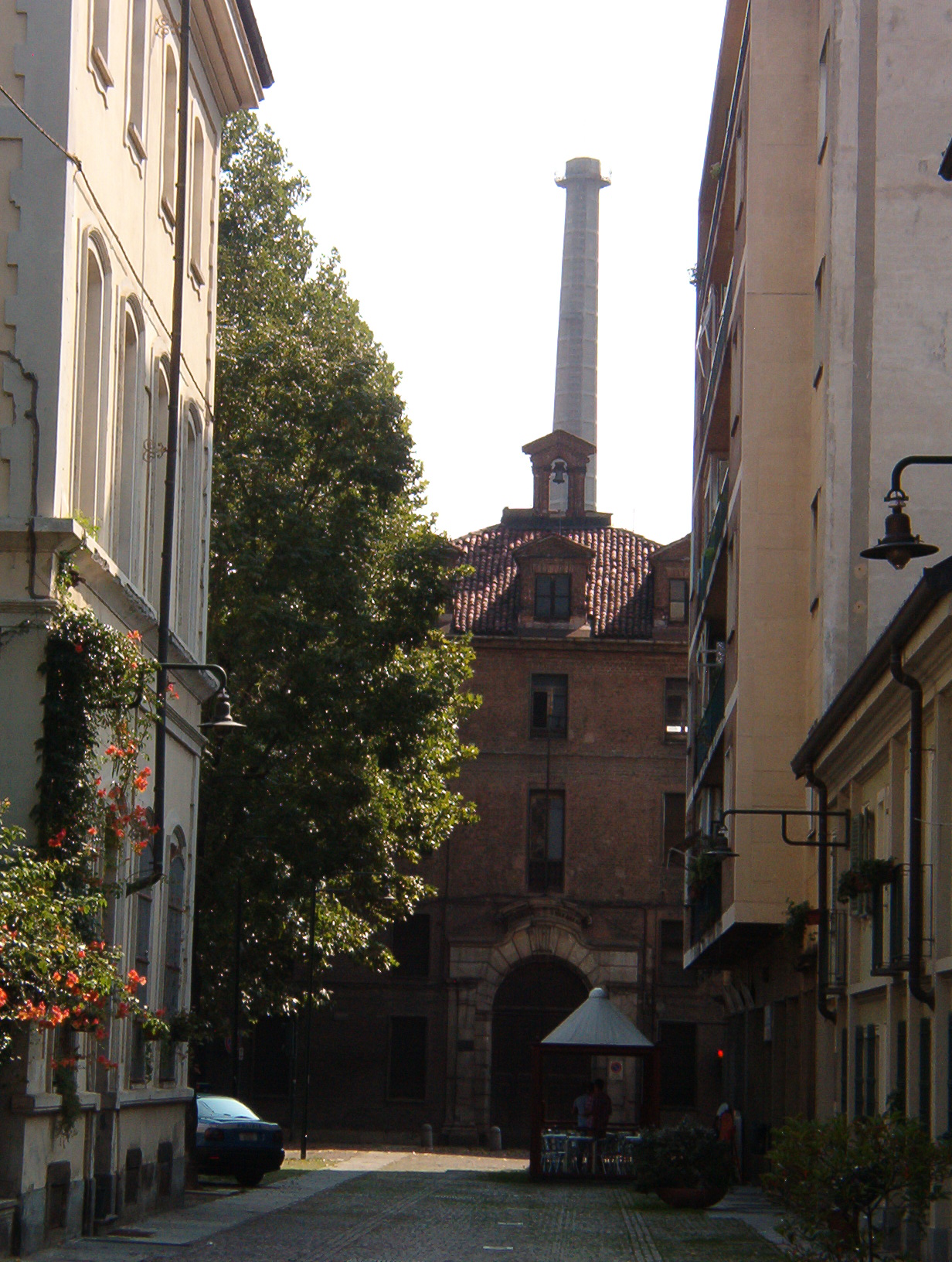 Manifattura Tabacchi - Quartiere Regio Parco - Torino - Italy